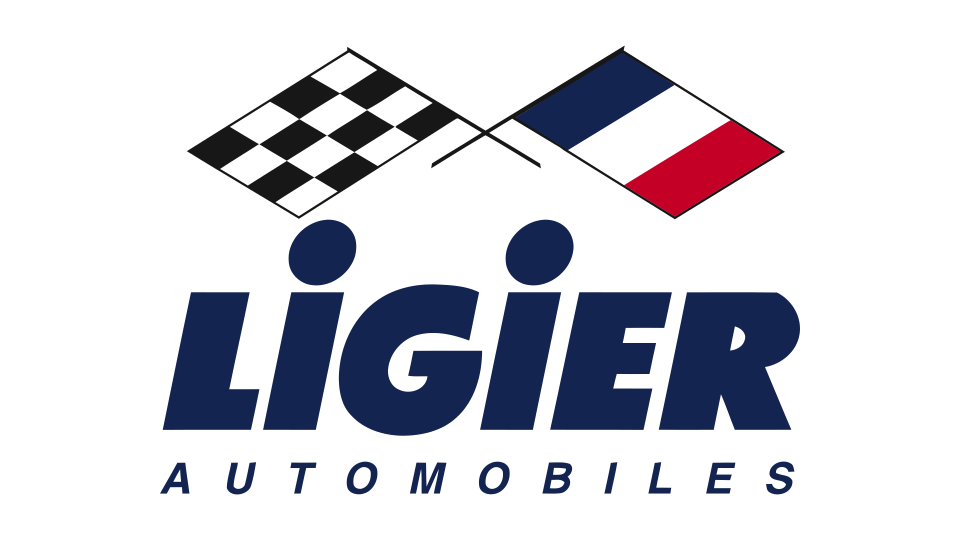 Logotipo Ligier